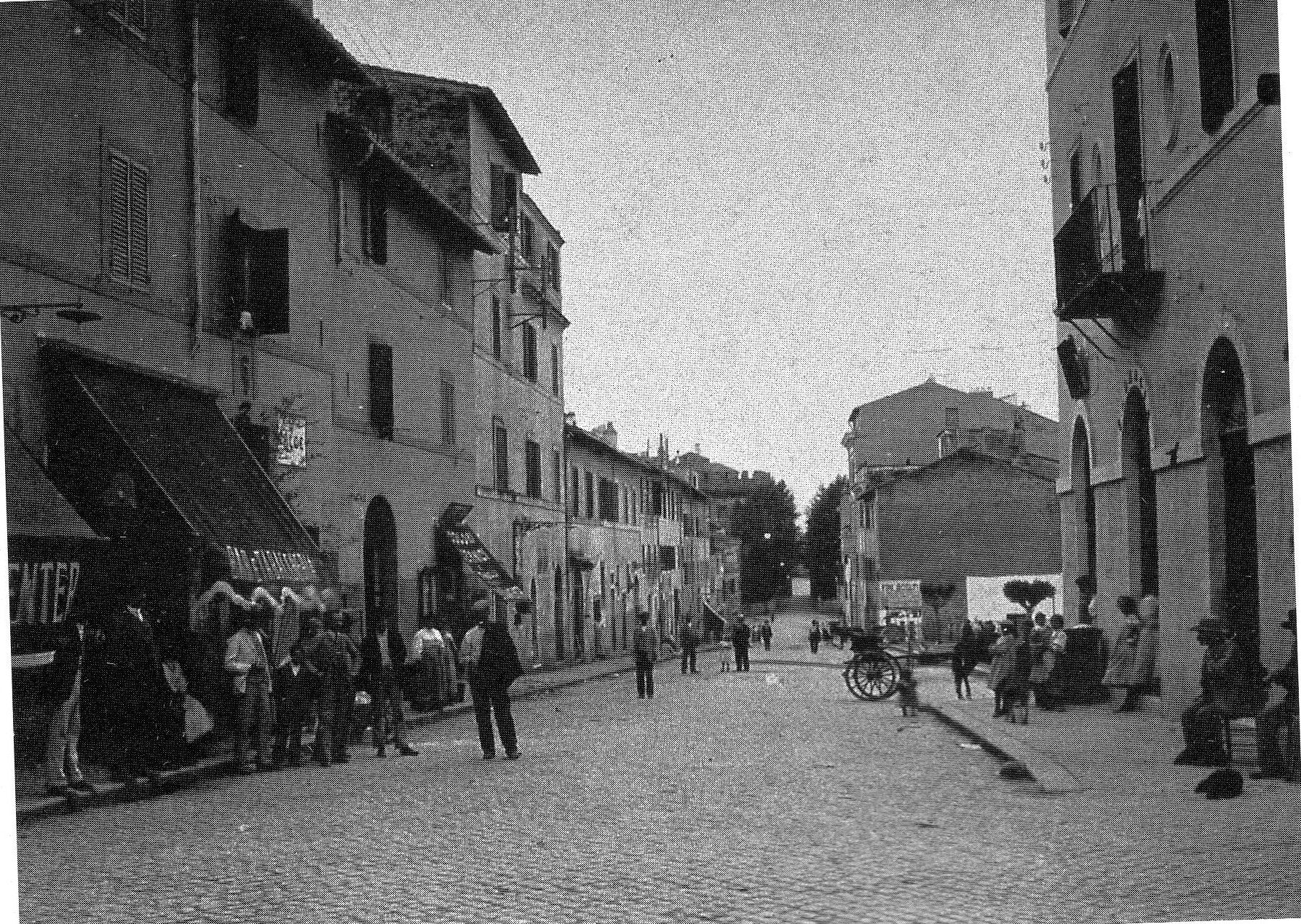 Corso del Popolo a Grottaferrata (RM) negli anni '10 del Novecento